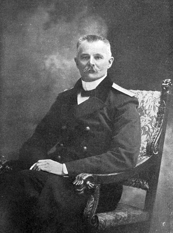 Дмитрий Николаевич Мартынов, русский государственный деятель, Варшавский губернатор, сенатор.